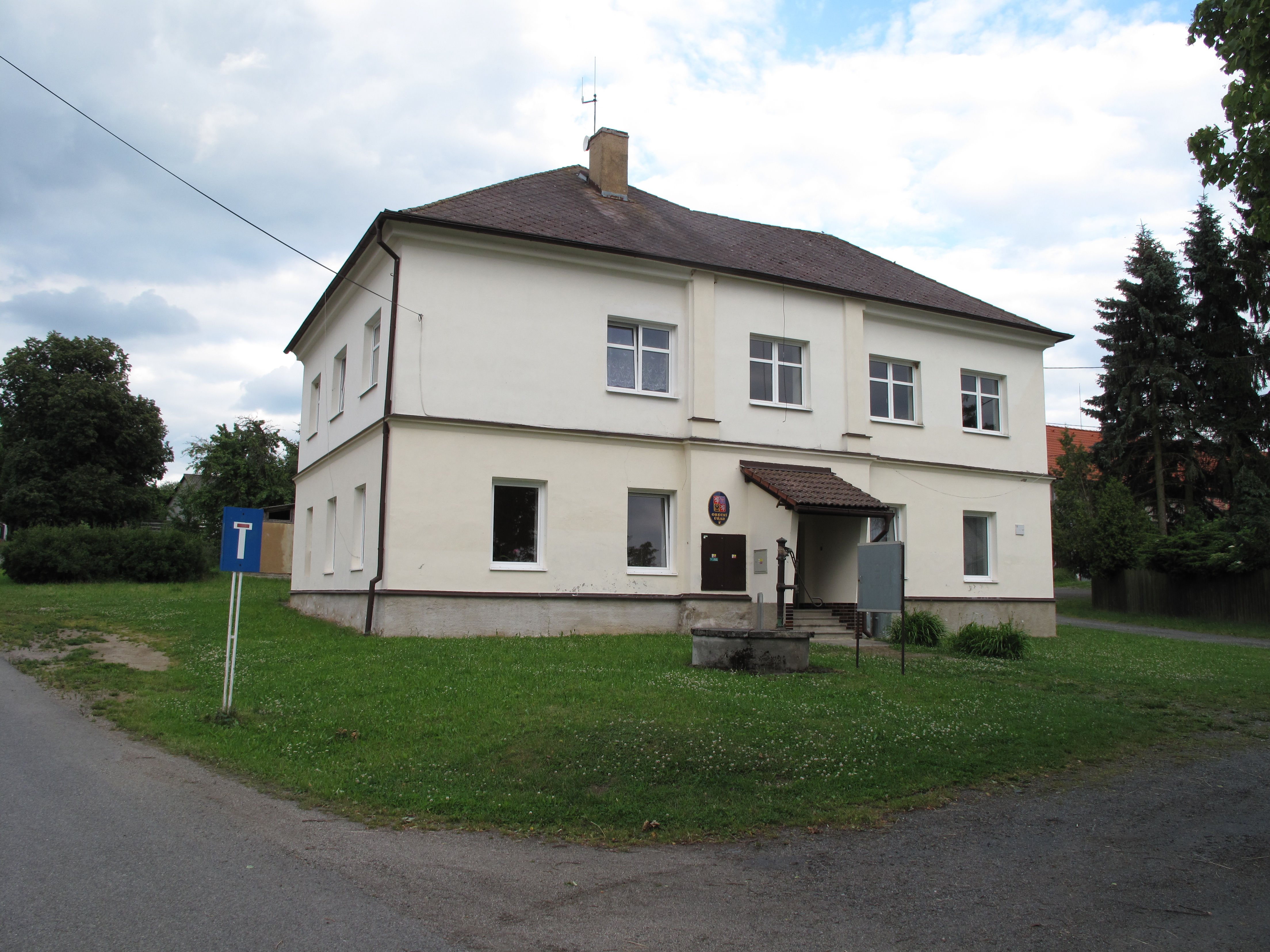 Obecní úřad v Trokavci. Okres Rokycany, Česká republika.